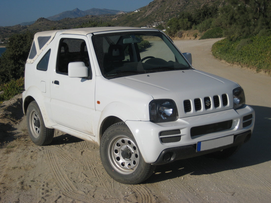 Document destiné à illustrer l'article sur le Suzuki Jimny.